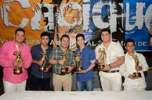 Cuadro de honor de todos los reyes del festival de la leyenda vallenata, celebrado en Valledupar (Cesar - Colombia)